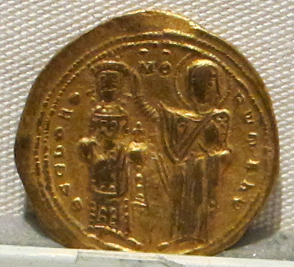 Palazzo Massimo alle Terme